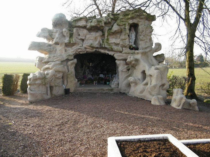 Réplique de la grotte de Lourdes à Vron.